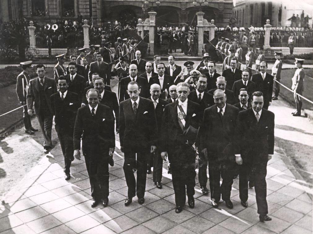 21/05/1945. Presidente Juan Antonio Ríos, ingresa al Salón del Congreso Pleno el 21 de Mayo de 1945. Comisión de Reja, aparecen entre otros: los Senadores, Francisco Urrejola, Gregorio Amunátegui, Luis Ambrosio Concha, Diputado Julio Barrenechea. Detrás: Marmaduke Grove, Elías Lafertte, Ulises Correa, Eduardo Alessandri y Eduardo Cruz-Coke.